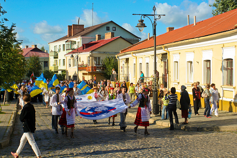 Old curb. Danyla Bratkovskogo street